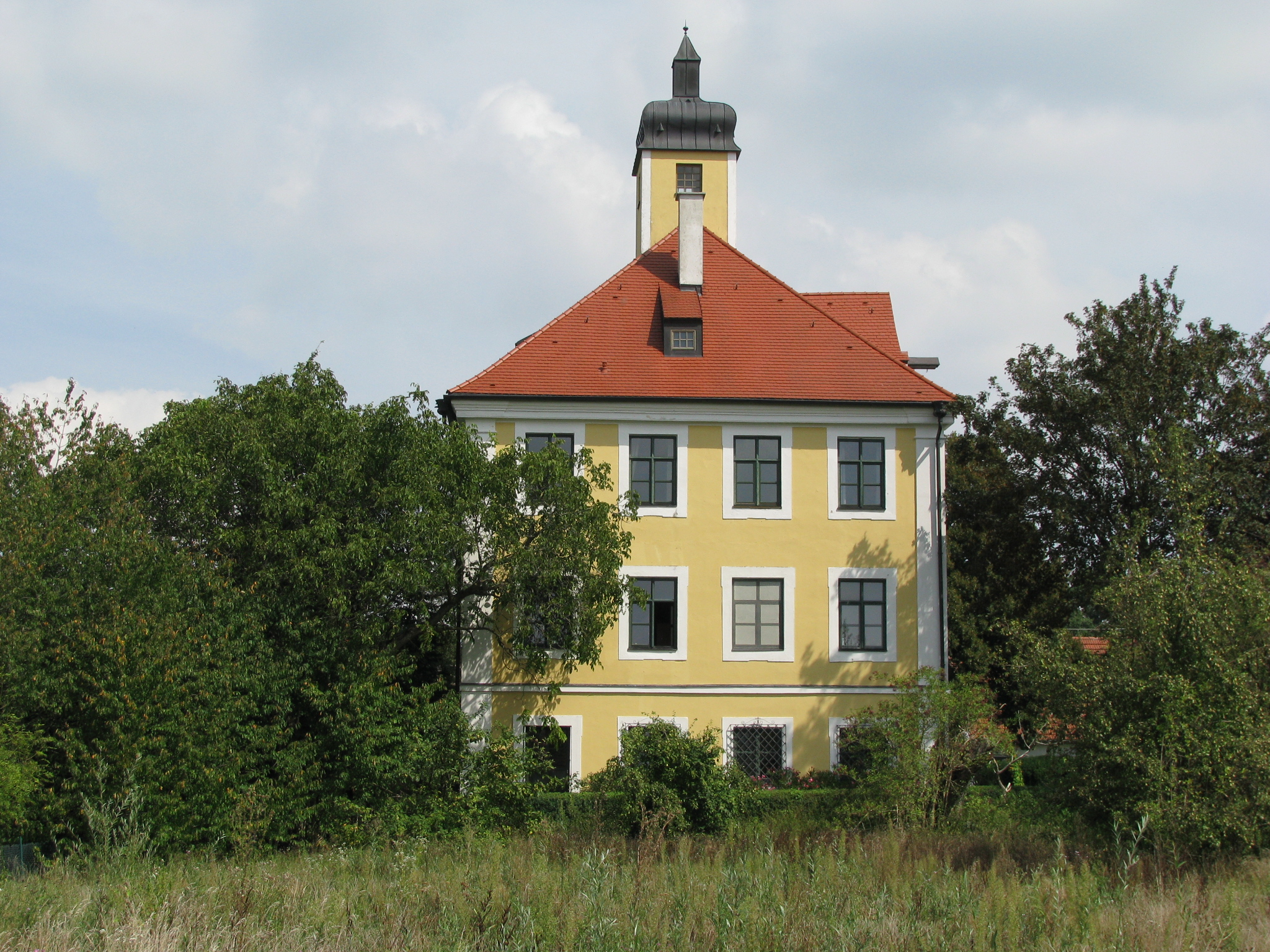 Schloss Schönbichl nördlich von Kranzberg bei Freising